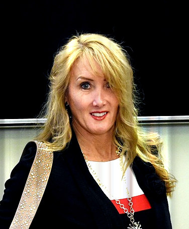 Ребекка Кисслинг, американская правозащитница.